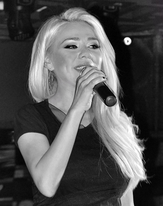 Гергана на участие в София